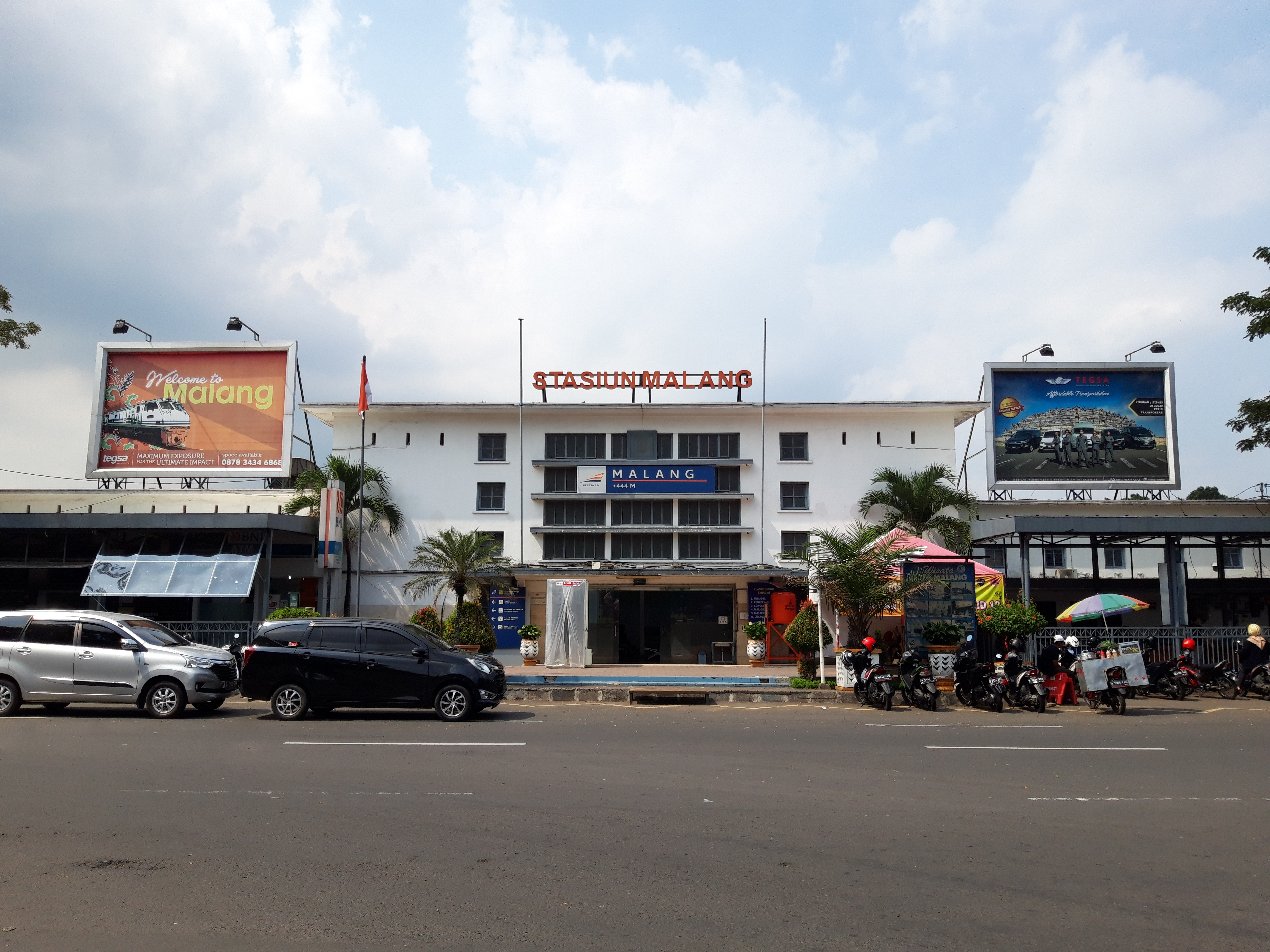 Tampak depan Stasiun Malang, 2020